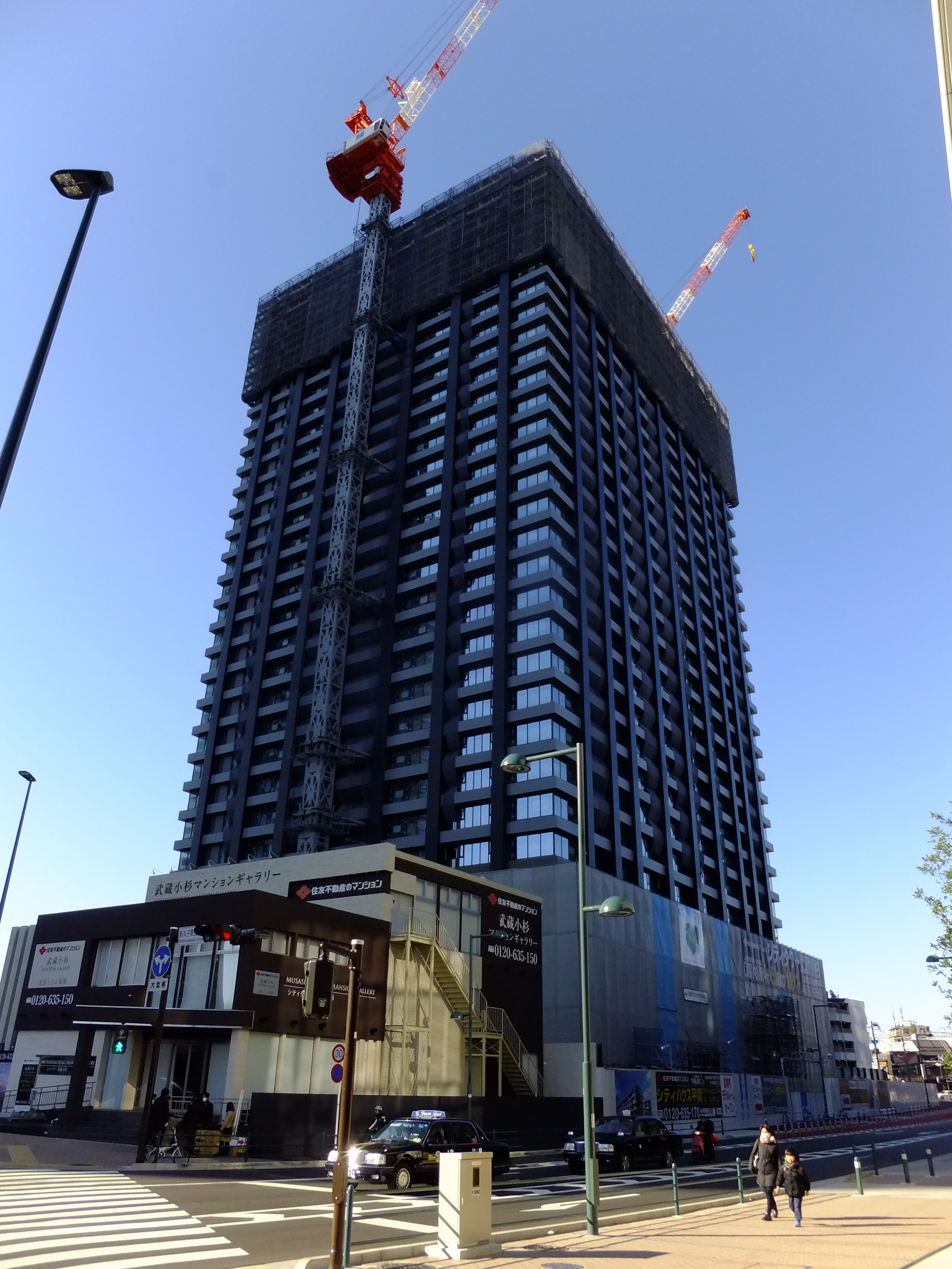 建設中のシティタワー武蔵小杉